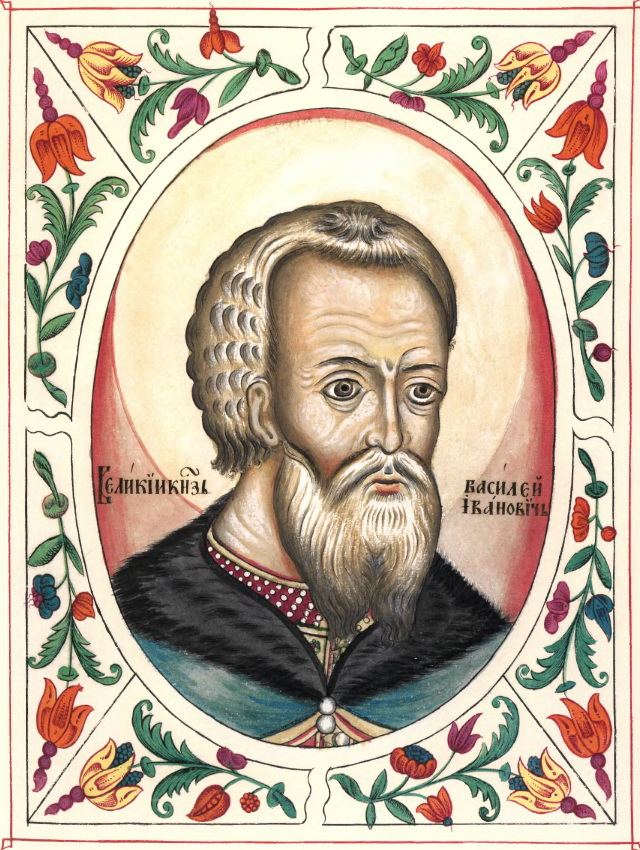 Отец Иоанна Грозного, Великий князь Московский Василий III. С Царского Титулярника